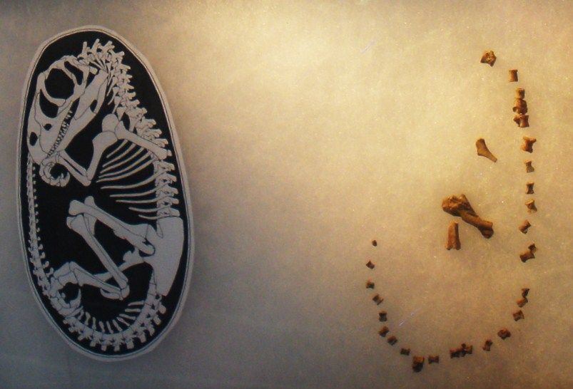 Fossil of Lourinhanosaurus, an extinct carnosaur- Took the photo at Fossil Show, Munich